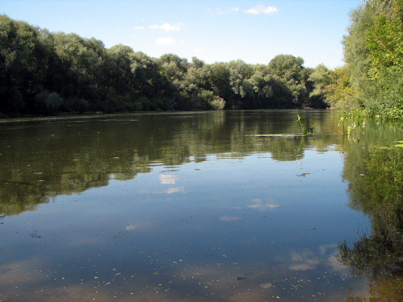 Seversky Donets near Shipilivka, Ukraine